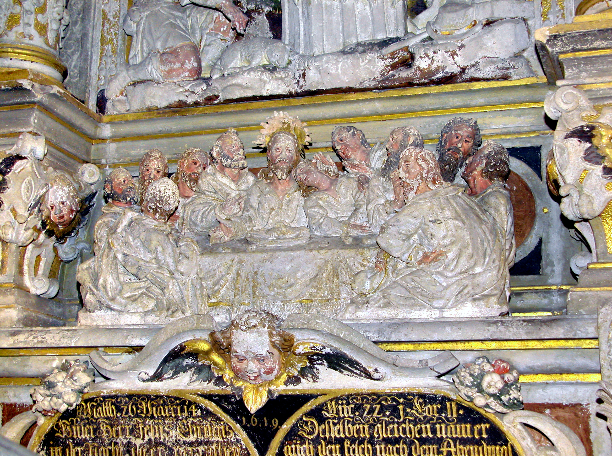 05.12.2009 01665 Burkhardswalde (Klipphausen) Kirchweg: Ehemalige Wallfahrtskirche (GMP: 51.073714,13.430011), Dorfkirche. Dreischiffige spätgotische Hallenkirche (15. Jahrhundert). Altaraufsatz (1619 von M. Kuntze) vor der Sanierung. [DSCN40321.TIF]20091205060DR.JPG(c)Blobelt